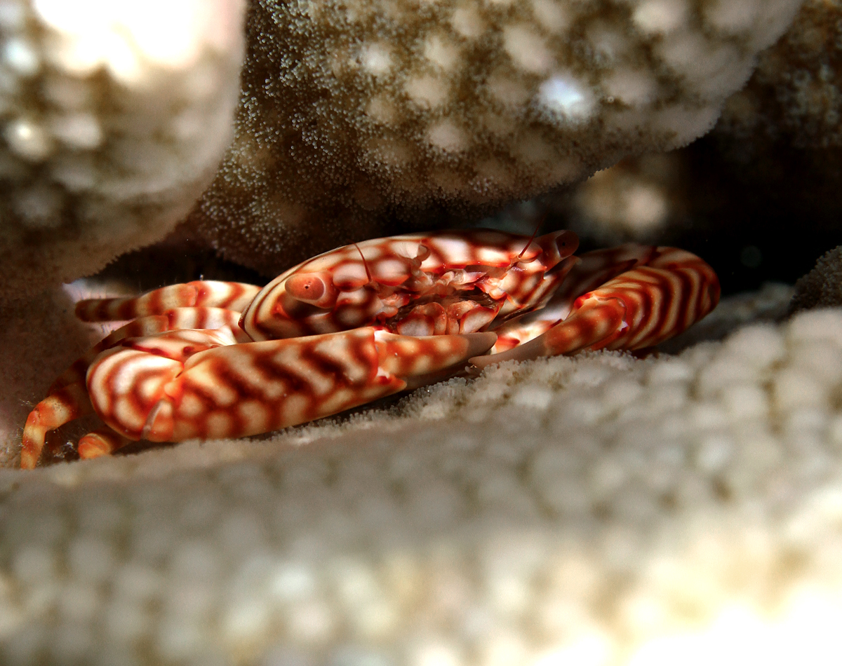 Le crabe "Trapézie à taches jaunes" Trapezia flavopunctata à la Réunion, caché dans un Pocillopora eydouxi.